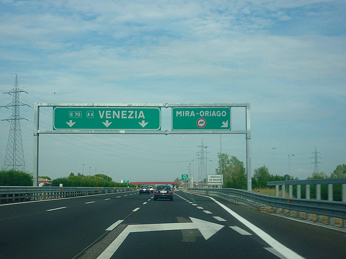 A57-Tangenziale di Mestre